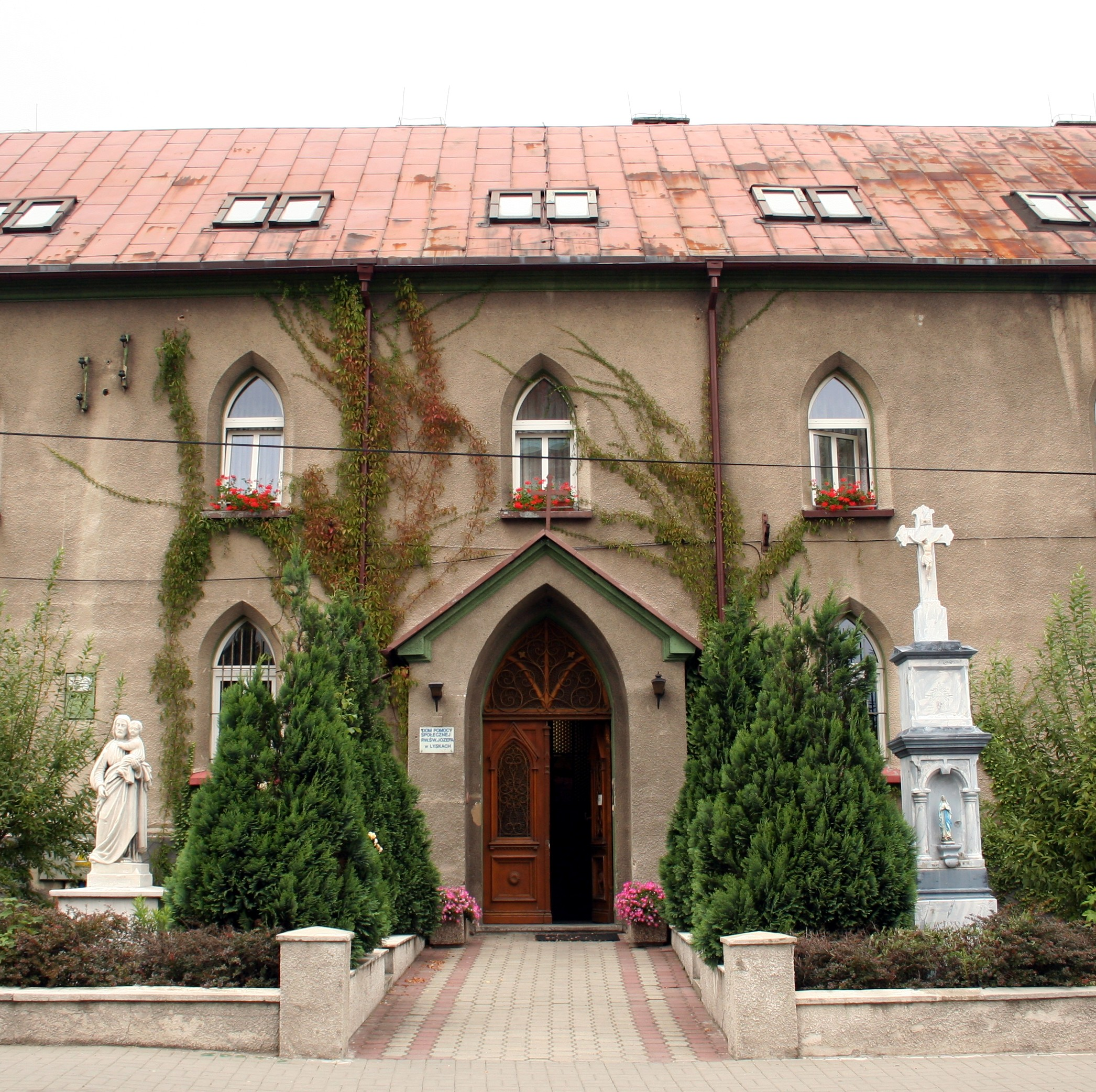 Dom Pomocy Społecznej w Lyskach, powiat rybnicki